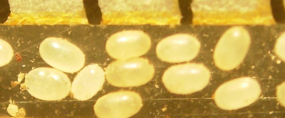 Oeufs de Ctenocephalides felis. Echelle en millimètres.